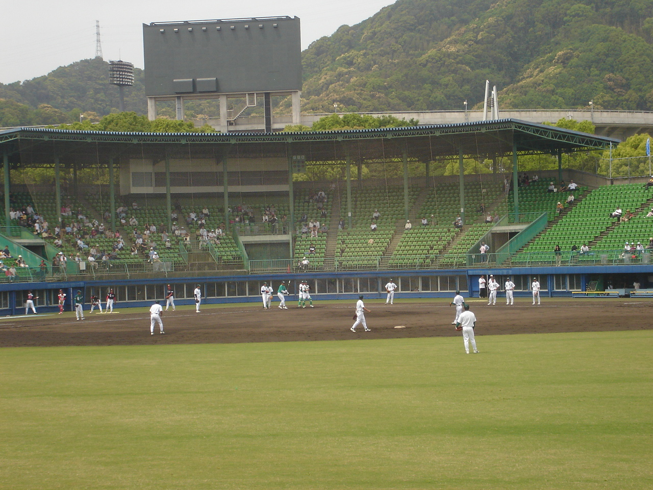 高知県立春野運動公園野球場。 - 日本国高知県春野町にある競技場。